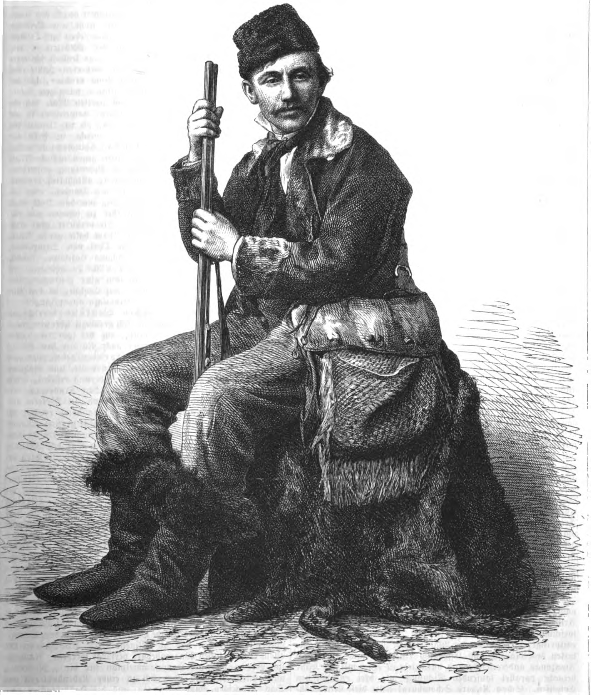 Gustav Radde, deutscher Geograph und Naturforscher im 19. Jh.